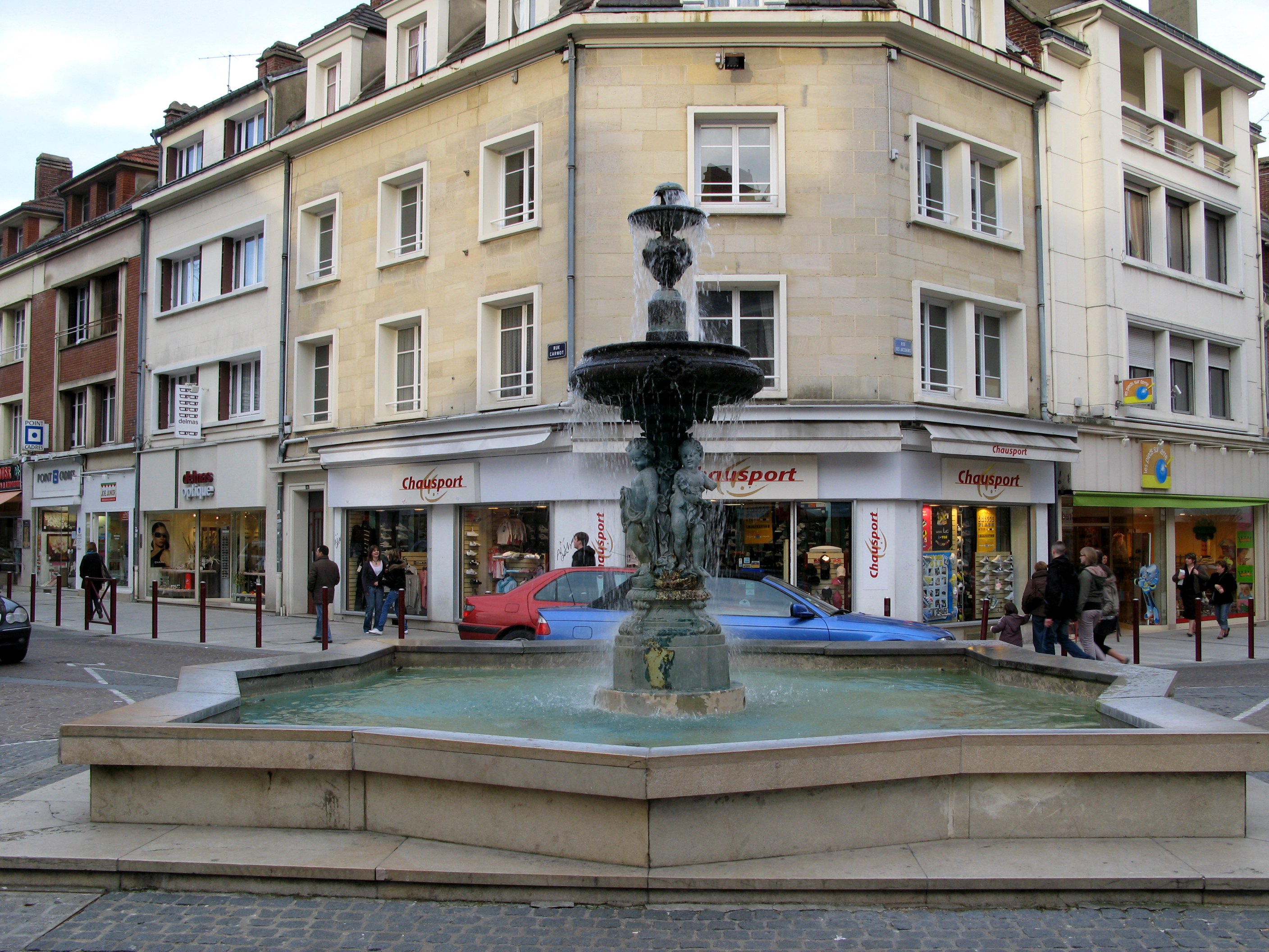 Beauvais (Oise, France) - Fontaine au croisement de la rue Carnot et de la rue des Jacobins.